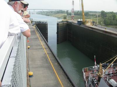 Wellandkanalen